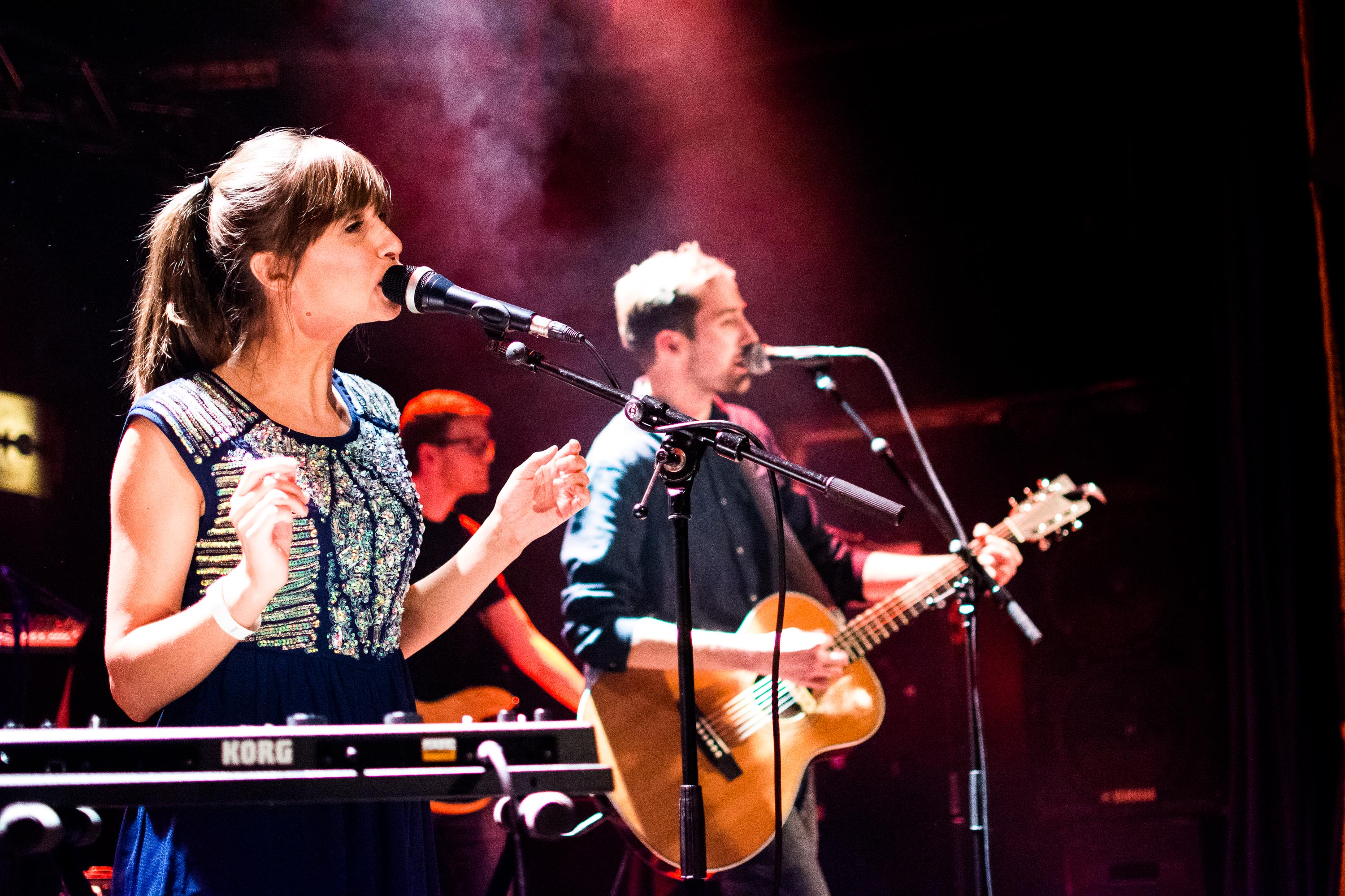 Liza und Kay bei einem Auftritt im Hamburger Musikclub Uebel und Gefährlich im Januar 2016.